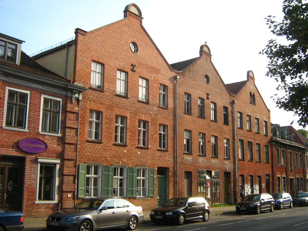 Potsdam, Holländisches Viertel an der Kurfürstenstraße.